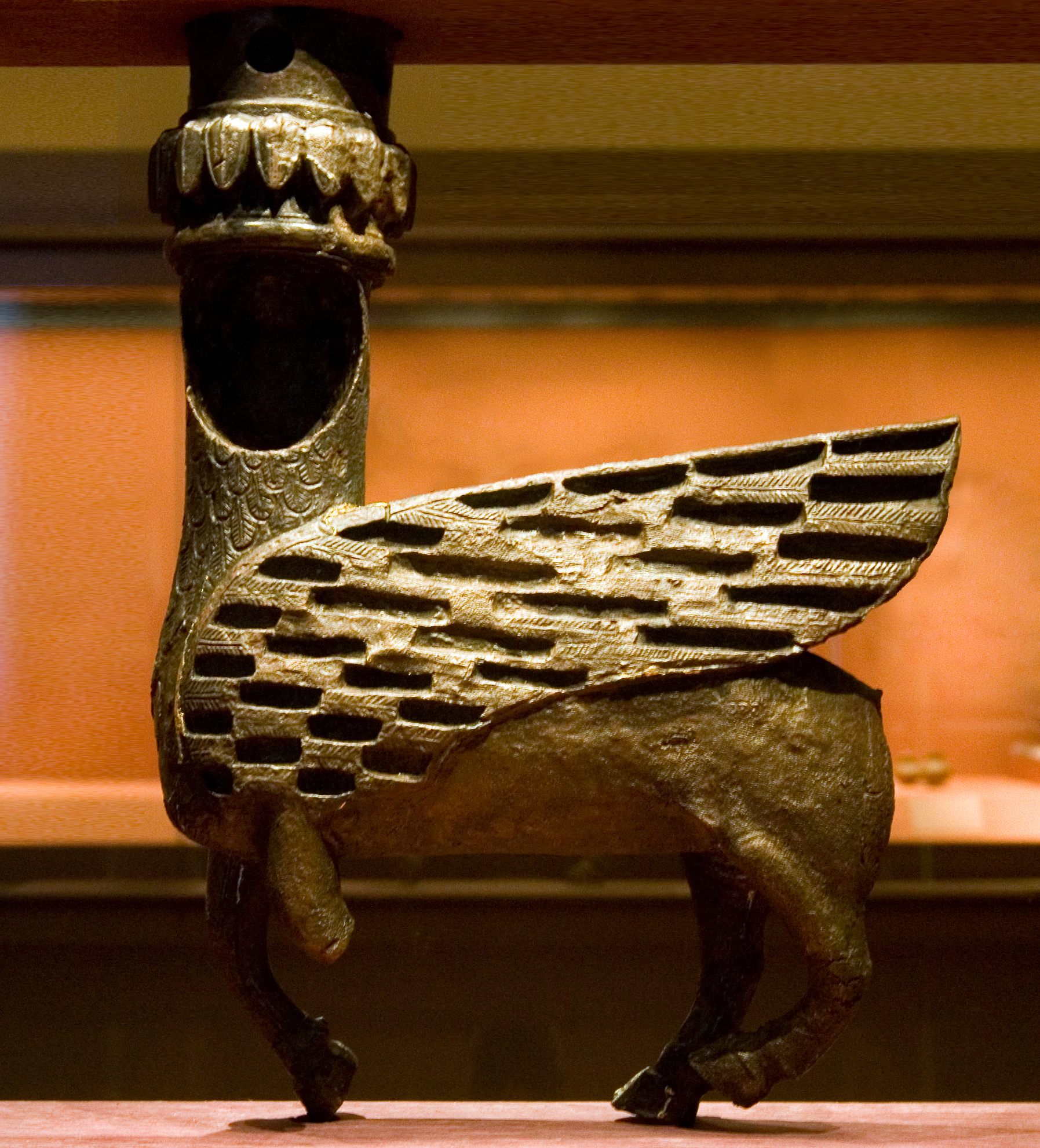 Urartian figurine, Hermitage Museum